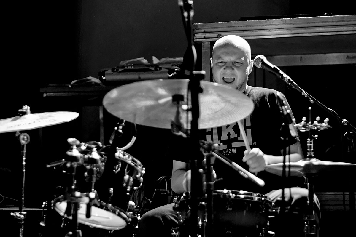 Pharfar ved en koncert med Jah Turban på Forbrændingen i Albertslund 9. november 2012